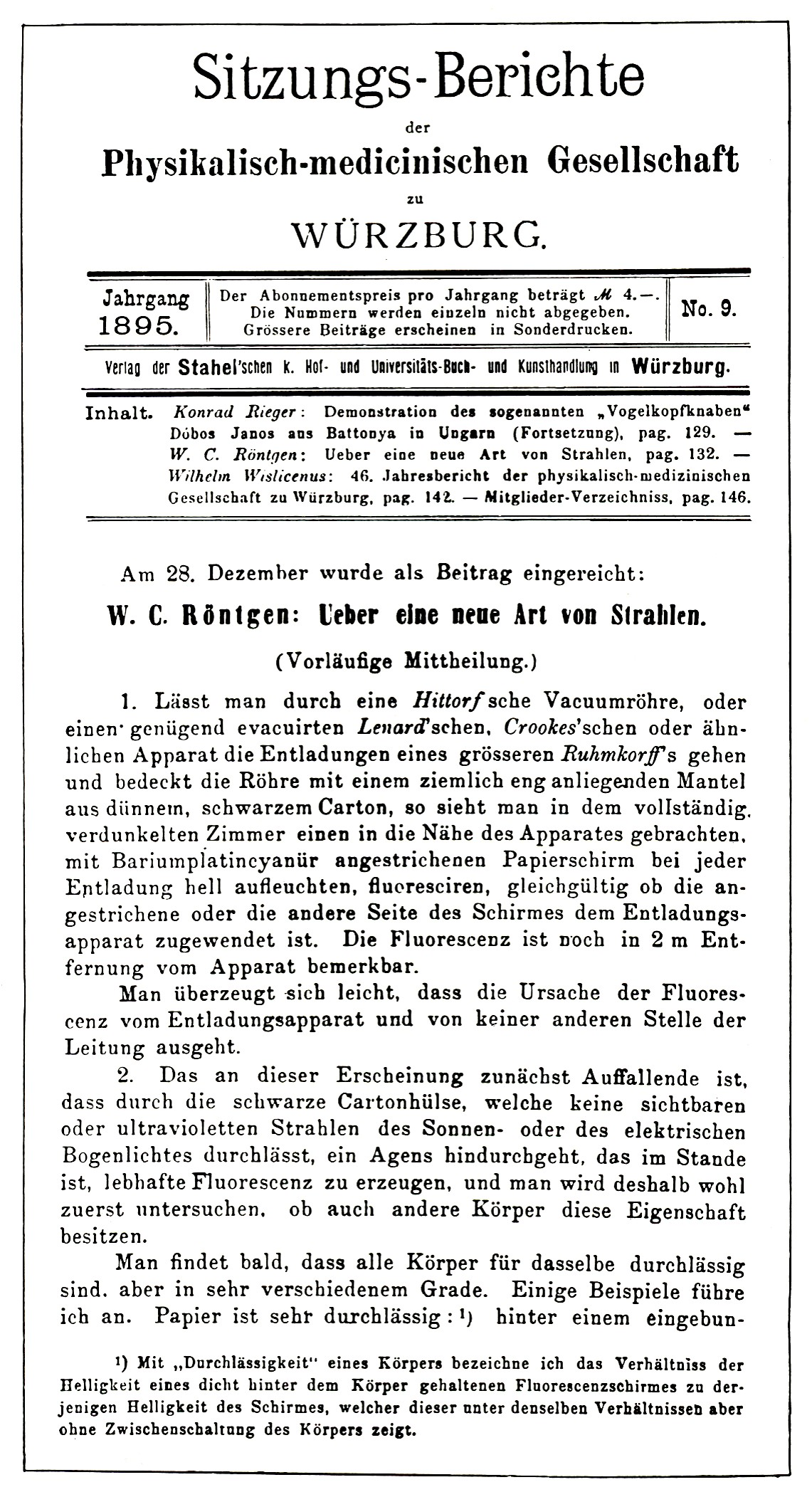 Sitzungsbericht der Physikalisch-medizinischen Gesellschaft, Würzburg, Dezember 1895, W.C. Röntgen: Ueber eine neue Art von Strahlen